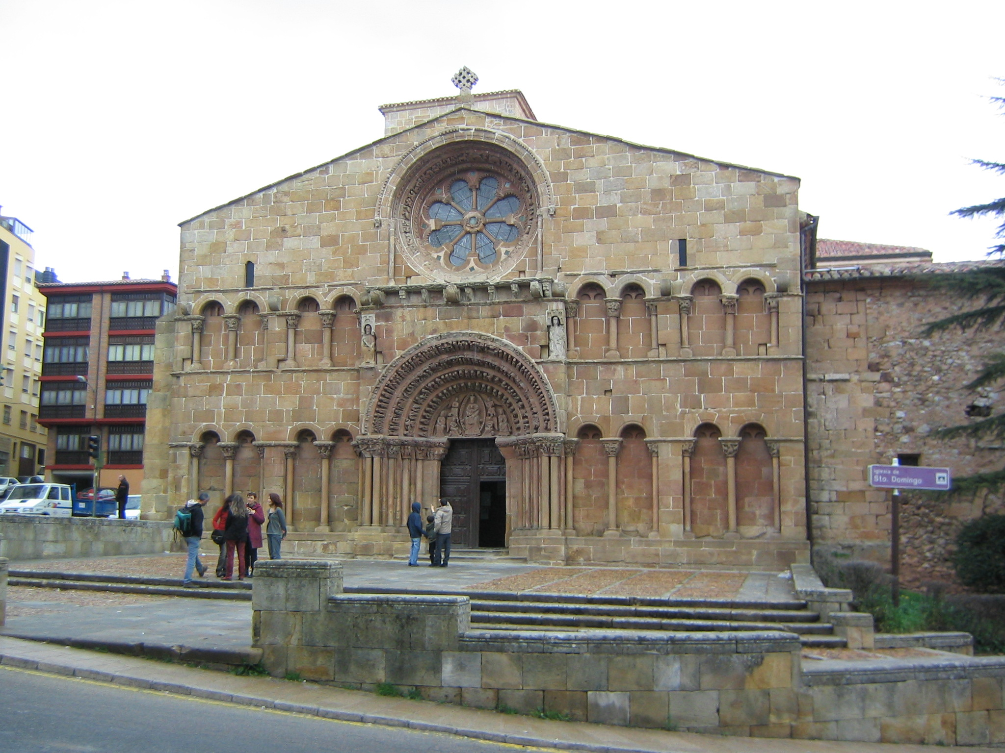 Iglesia de Santo Domingo en Soria, Soria (Castilla León) (España).